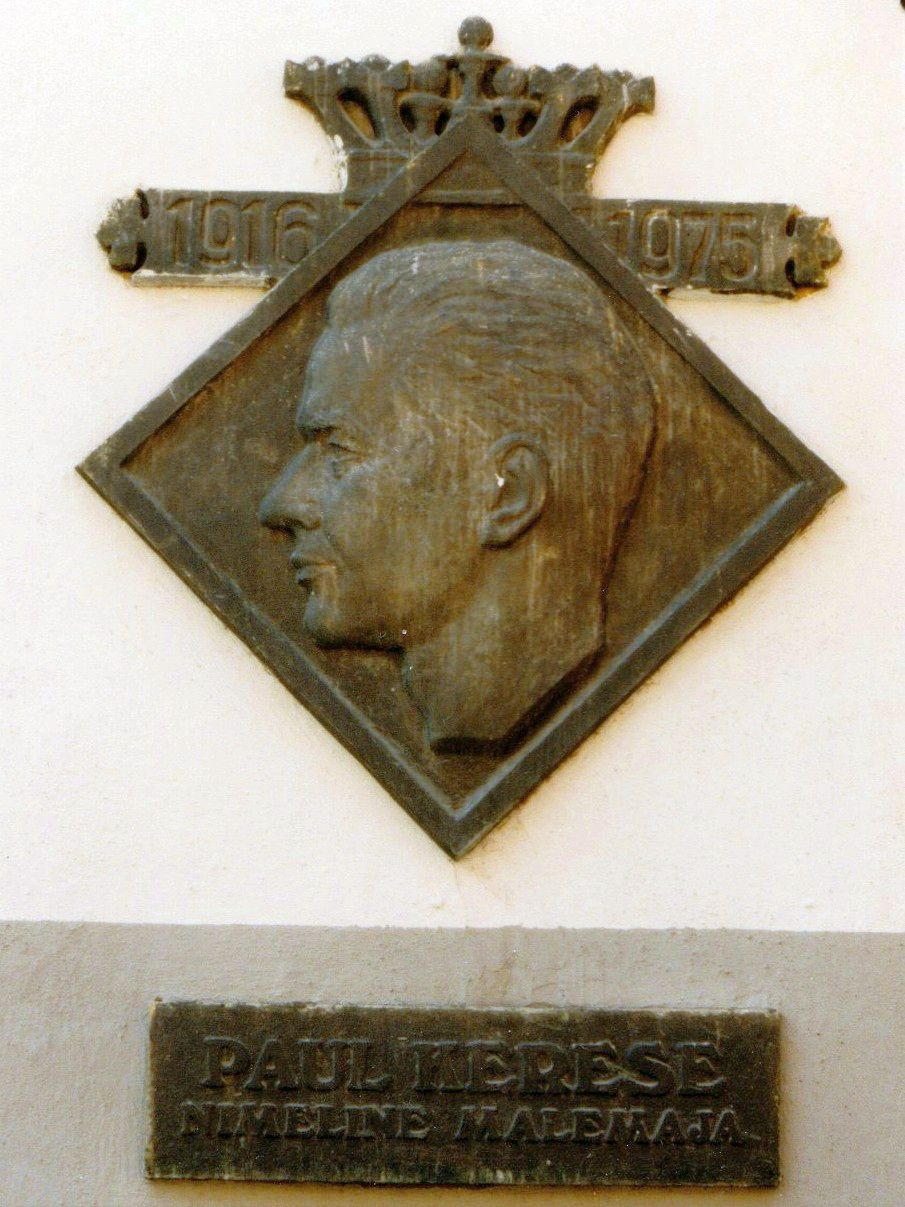 Gedenktafel für Paul Keres in der Tallinner Altstadt (Vene-Straße 29)